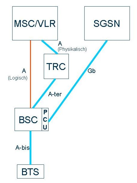 BSC-Schnittstellen